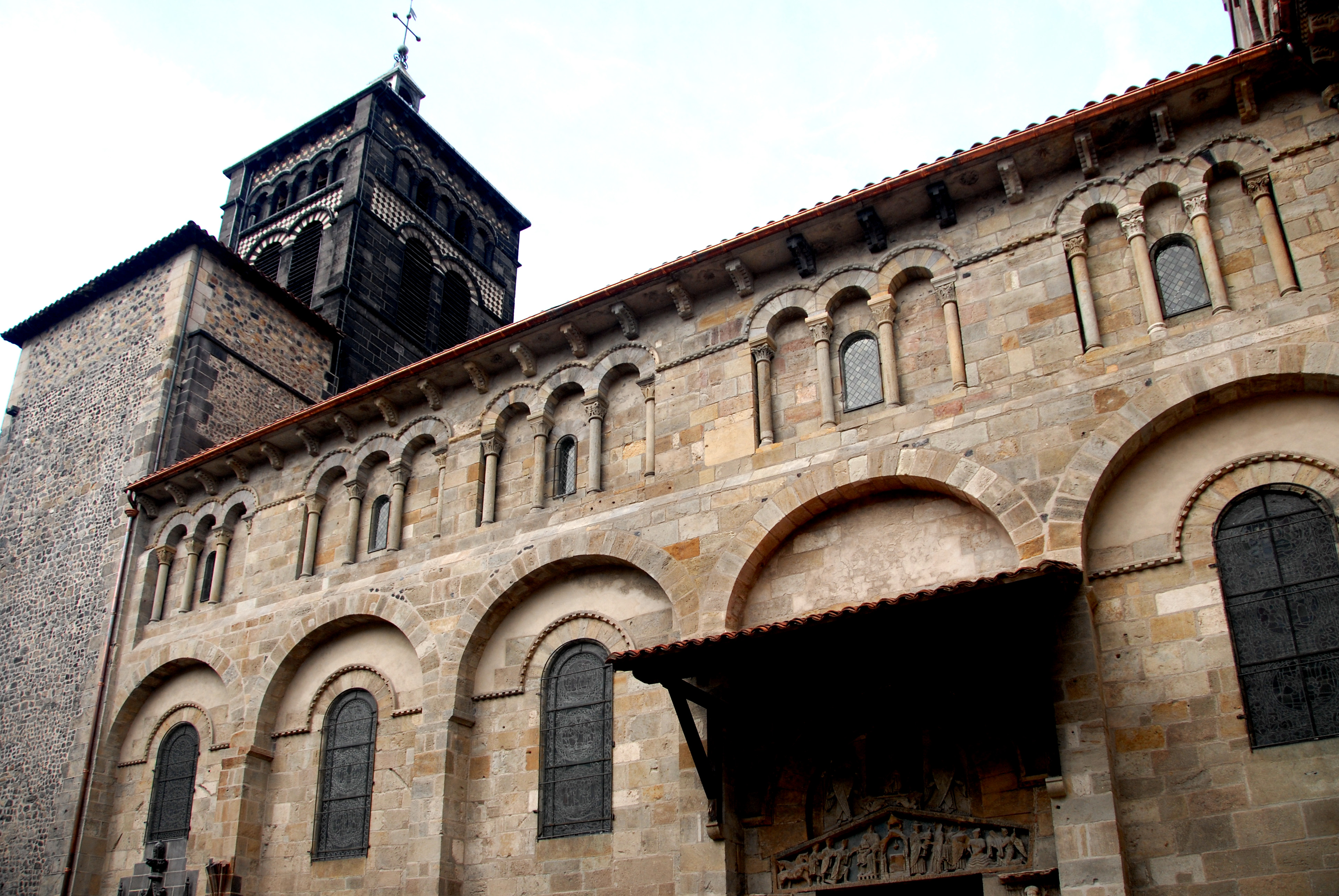 Notre-Dame du Port, Langhaus von S